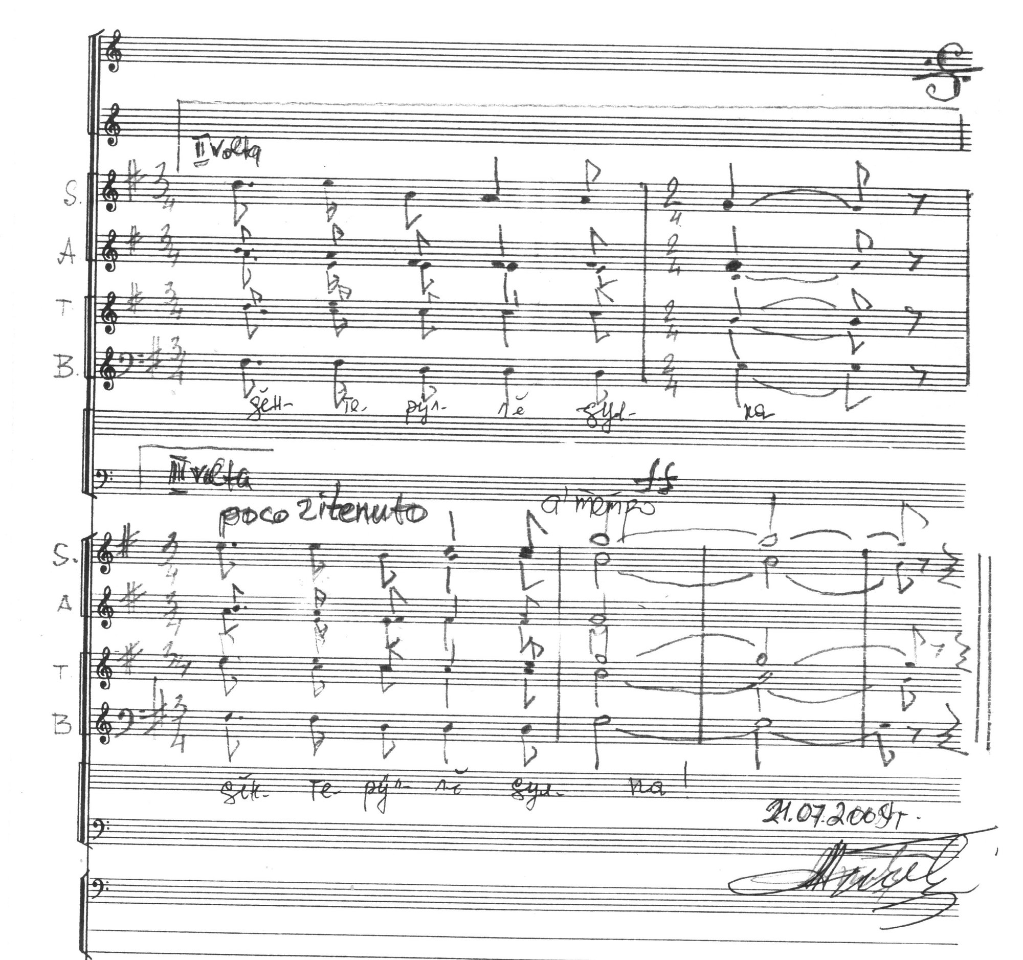 Гимн города Чебоксары, принятый 24 декабря 2009 года. Слова П. В. Афанасьева, музыка Ф. М. Лукина. Рукописный вариант